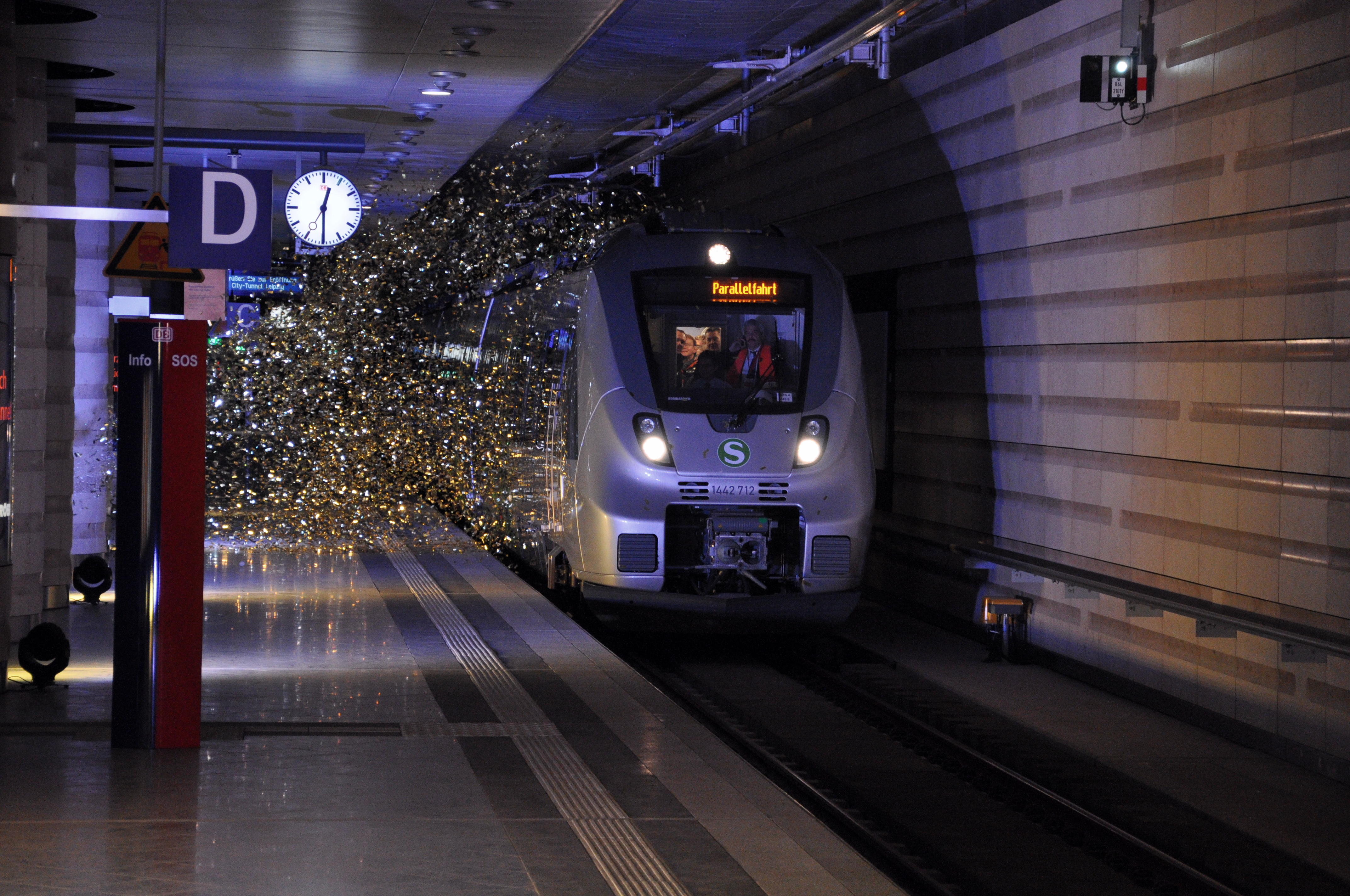 Einfahrt eines der zwei Eröffnungssonderzüge (1142 712/212) auf Gleis 1 der Station Hauptbahnhof (tief) im City-Tunnel Leipzig